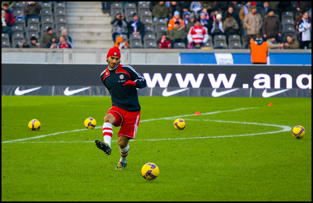 Hertha Berlin 2 - 1 Bayern Munich (avant match)